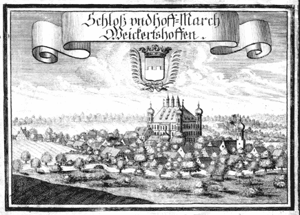 Kupferstich des Schlosses Unterweikertshofen